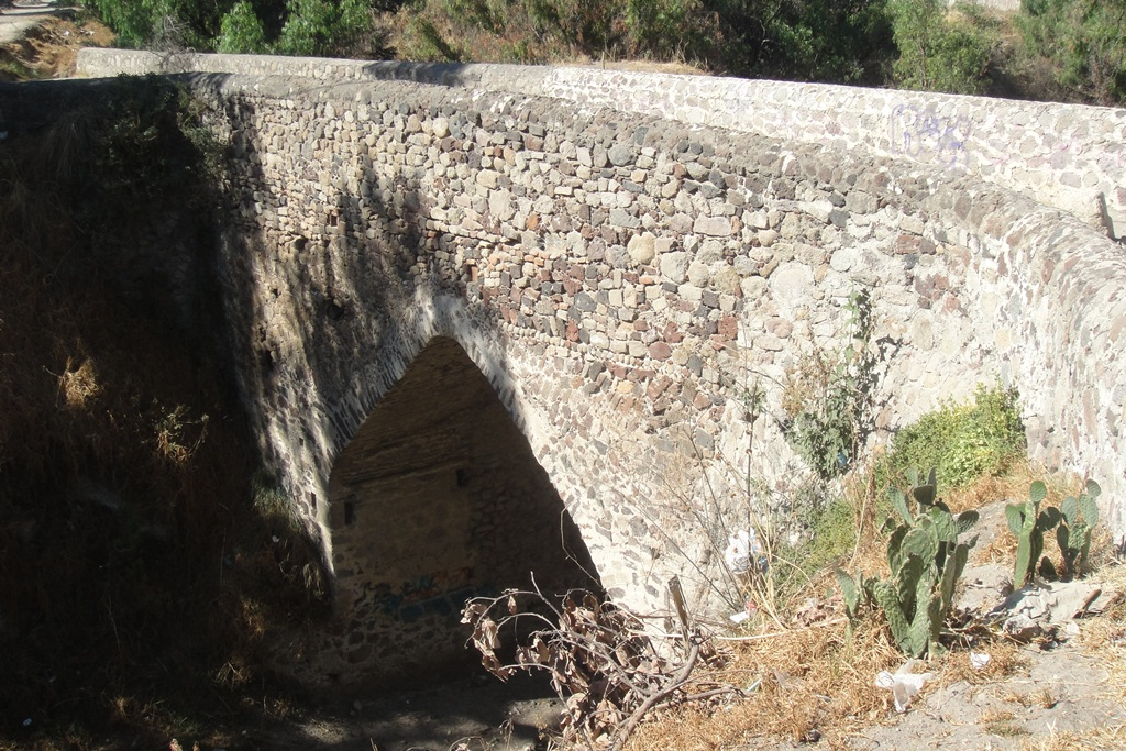 Huexotla bridge, side view